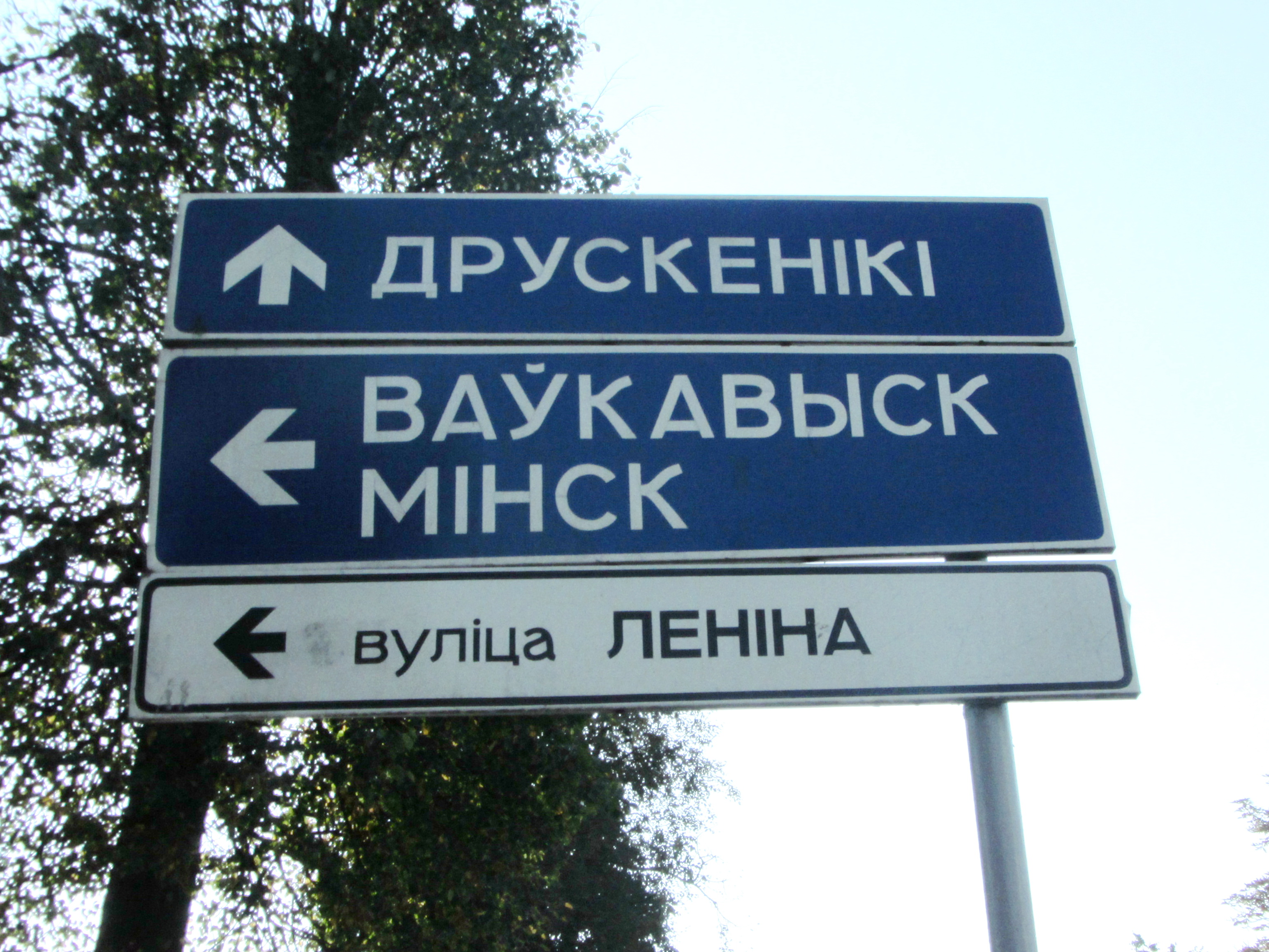 Беларуская (тарашкевіца): Дарожны ўказальнік у Горадні з традыцыйнай назвай гораду Друскенікі.